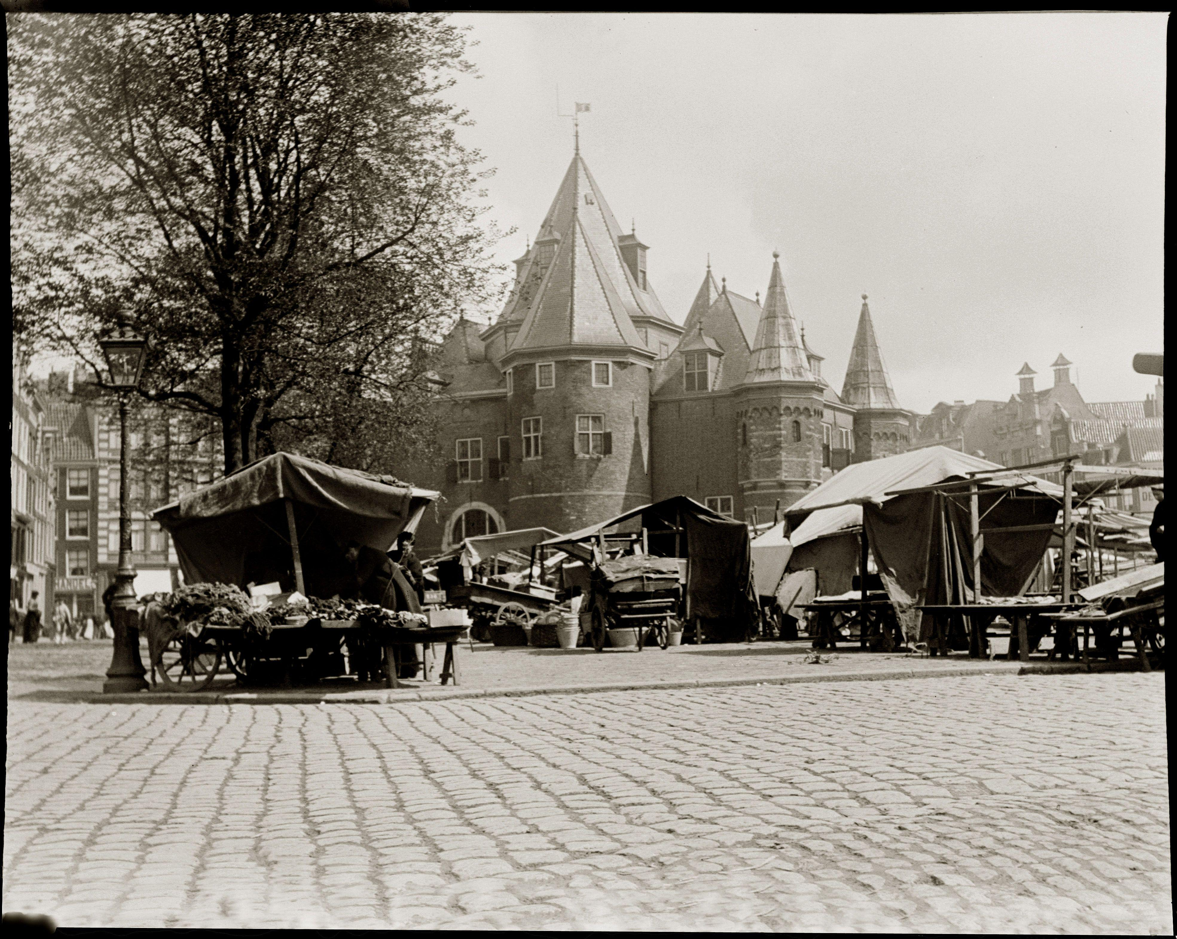 Foto van de Nieuwmarkt gemaakt in september 1902. Jacob Olie overleed in 1905. Bron: Gemeentearchief Amsterdam.